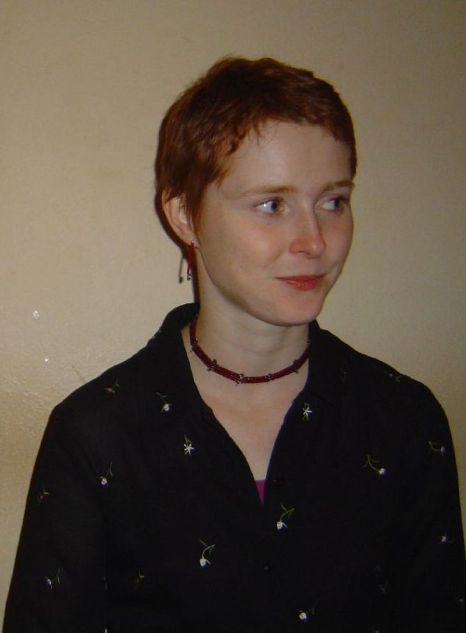 Marie Šťastná, Czech poet, born 1981